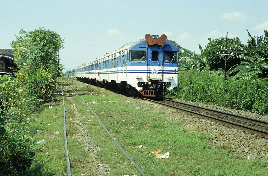 PTKA KRD (A)